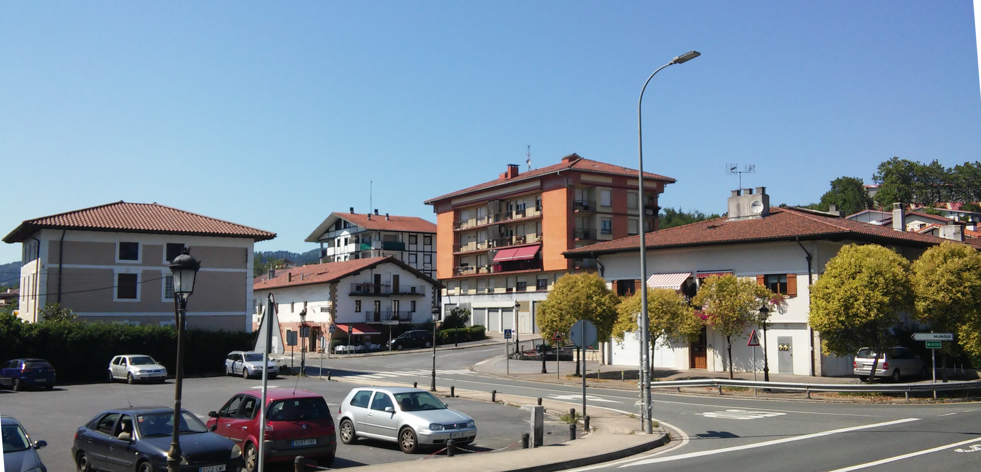 Muxikako Kurtzero auzoa, tren geltokitik ikusita